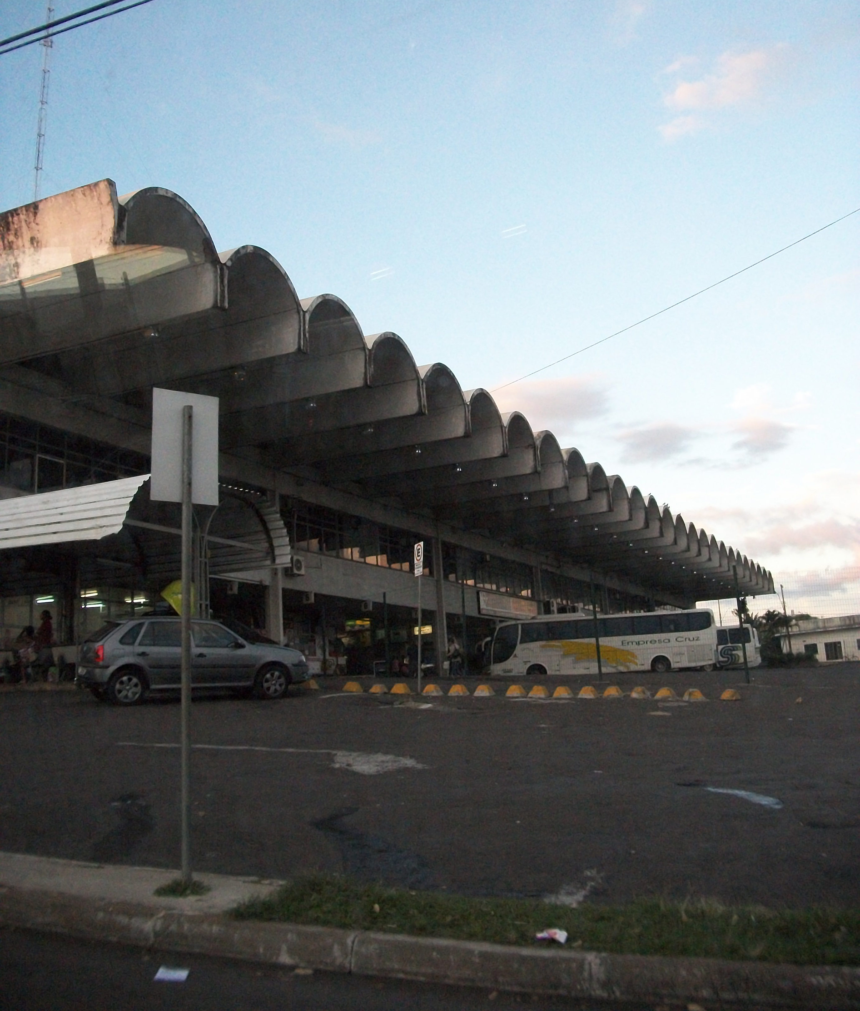 Rodoviária da cidade de Araçatuba.